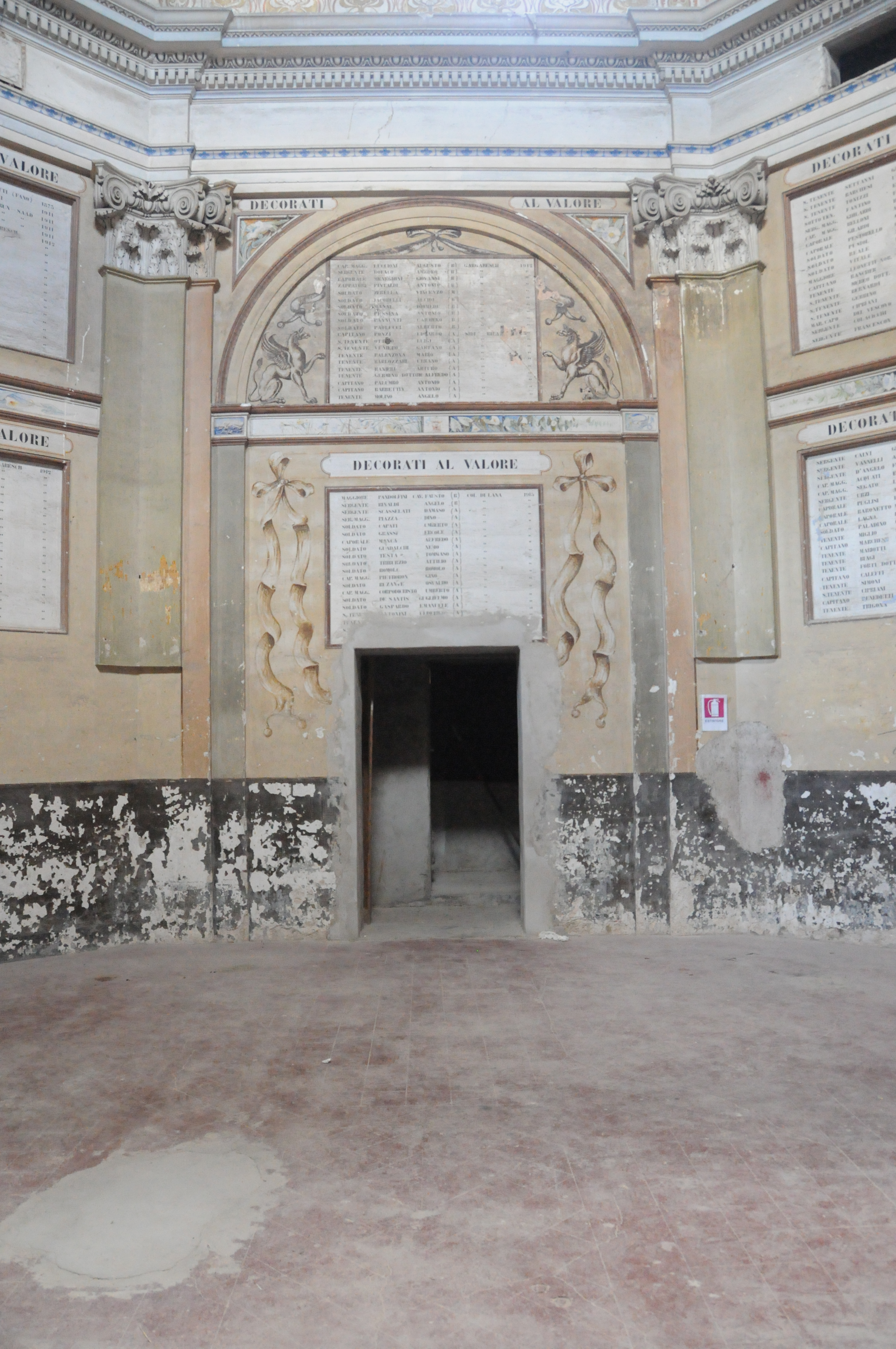 Santi Tommaso e Stefano della Stella - Oratorio